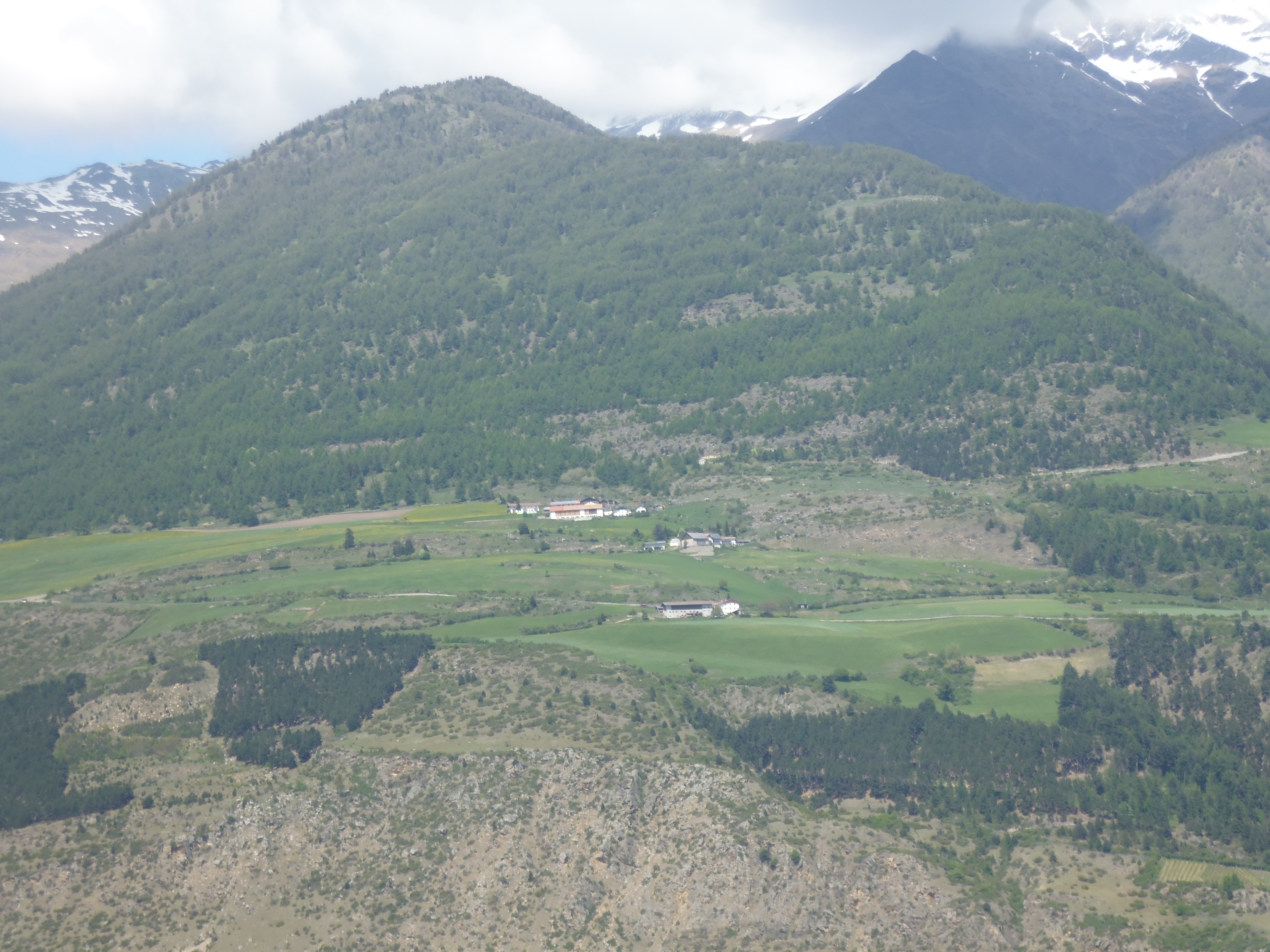 Tröghöfe bei Allitz von Parnatz aus